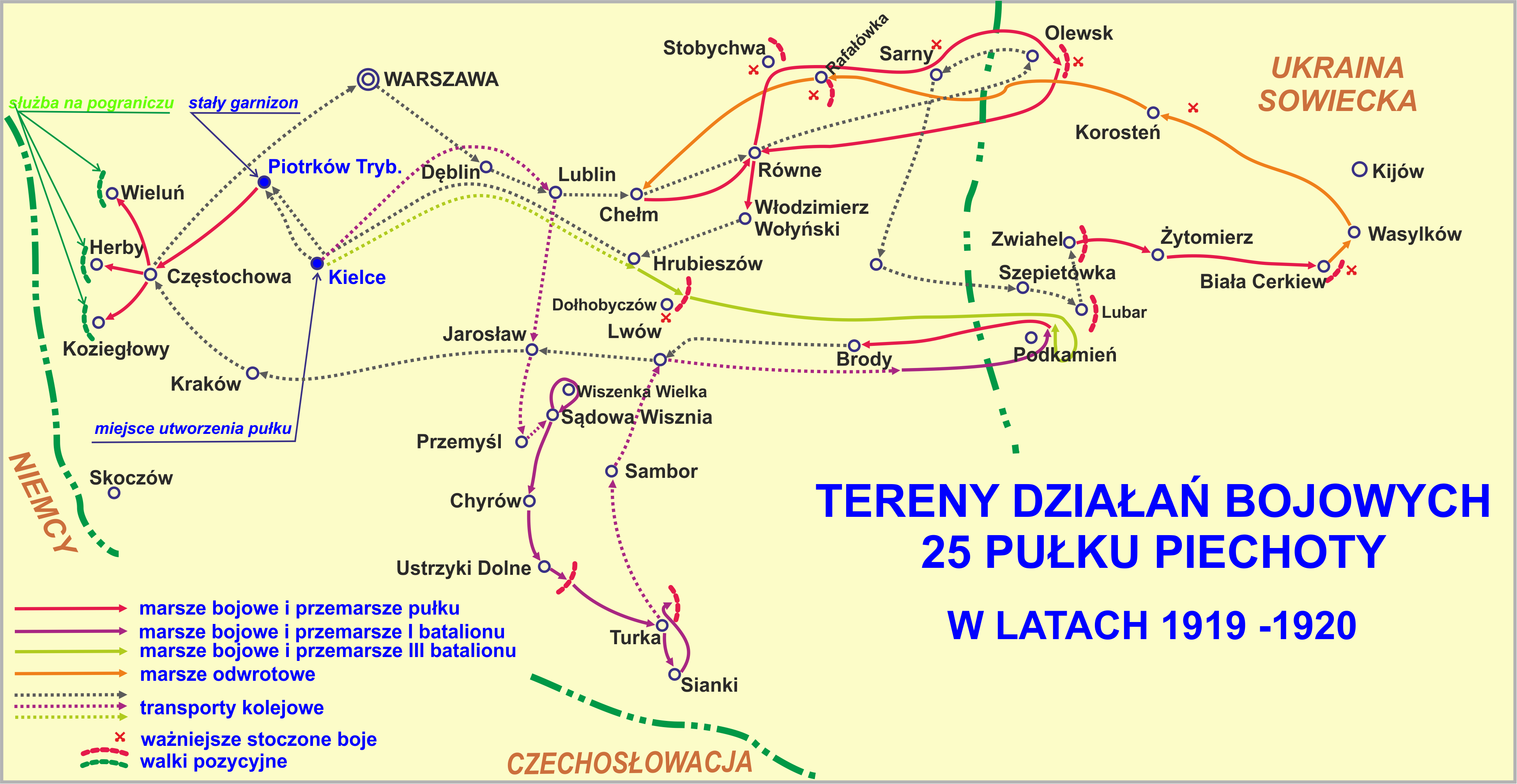 Tereny działań bojowych 25 Pułku Piechoty w latach 1919 -1920